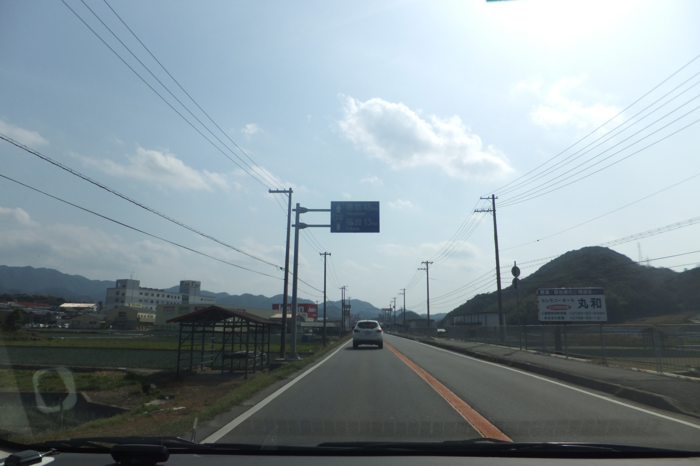 兵庫県南あわじ市広田広田 国道28号